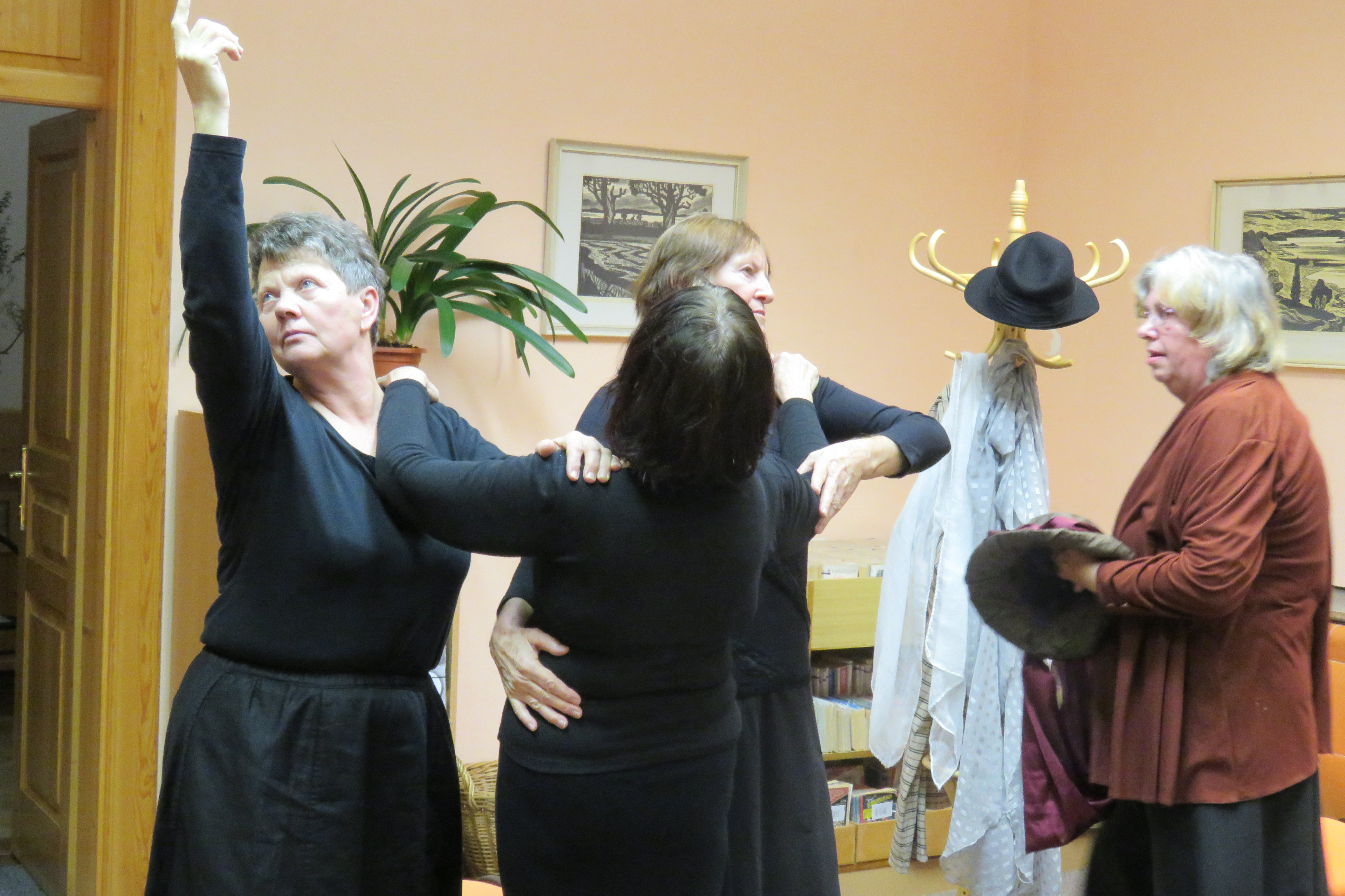 Autorská divadelní hra Ženy o čtyřech ženách naší historie: Perchtě z Rožmberka, Mileně Jesenské, Emě Destinnové a Kamile Schönfeldové - Zemanové.